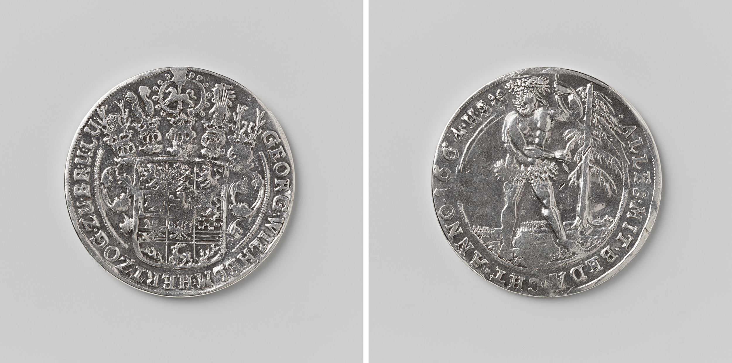 IdentificatieTitel(s): Thaler van Georg Willem, hertog van Brunswijk-LuneburgObjecttype: munt taler Objectnummer: BK-14908Omschrijving: Zilveren schroefmunt Voorzijde: wilde man, staande bij boom binnen omschrift. Keerzijde: wapenschild onder vijf helmen binnen omschrift.VervaardigingVervaardiger: Henning SchlüterPlaats vervaardiging: DuitslandDatering: 1664Materiaal: zilver Techniek: slaanAfmetingen: d 4,4 cm × g 142 grOnderwerpWanneer1664 - 1664WieGeorg Willem hertog van Brunswijk-LüneburgVerwerving en rechtenCredit line: Schenking van een particulierVerwerving: schenking 1937Copyright: Publiek domein